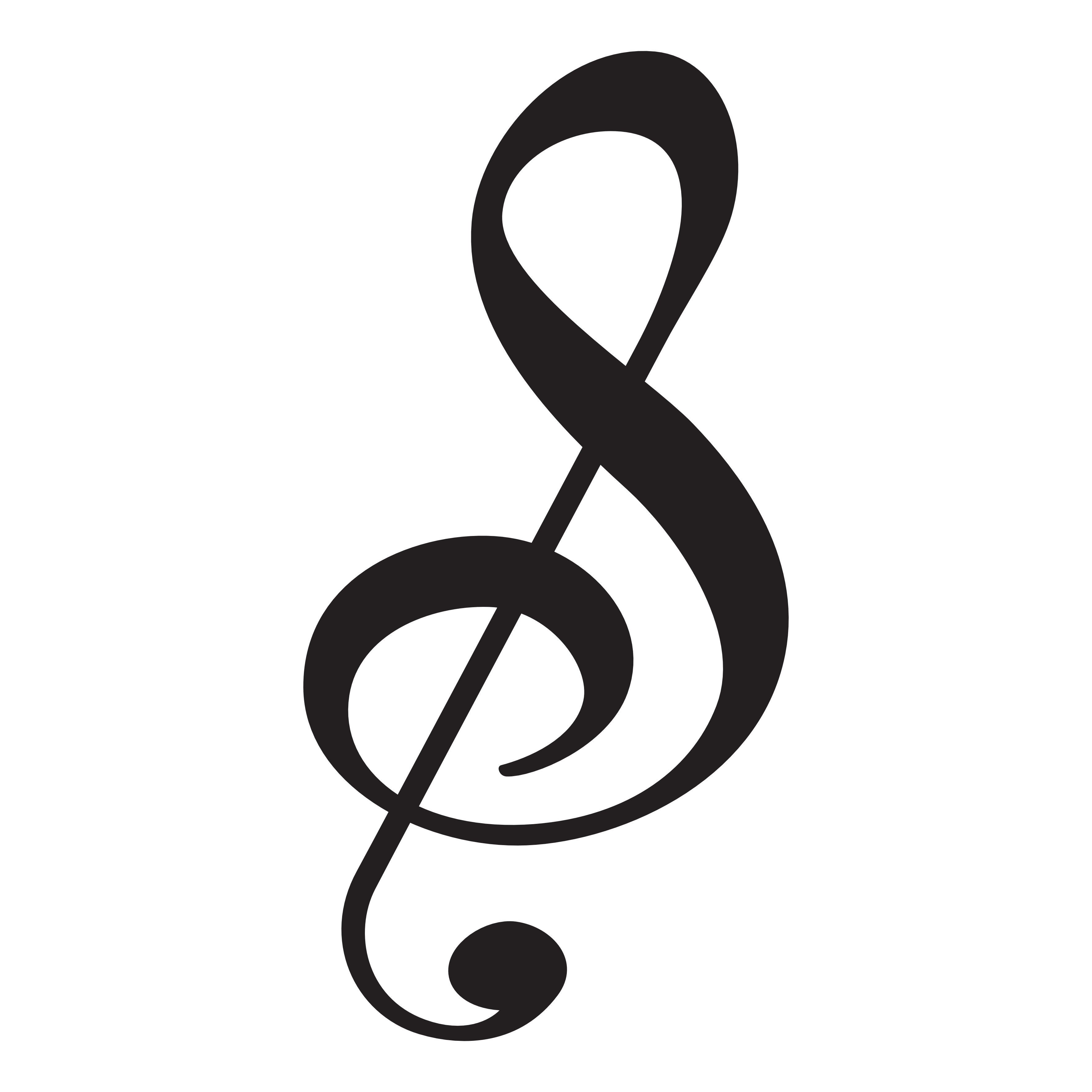 Stockholms universitetskörs logotyp.